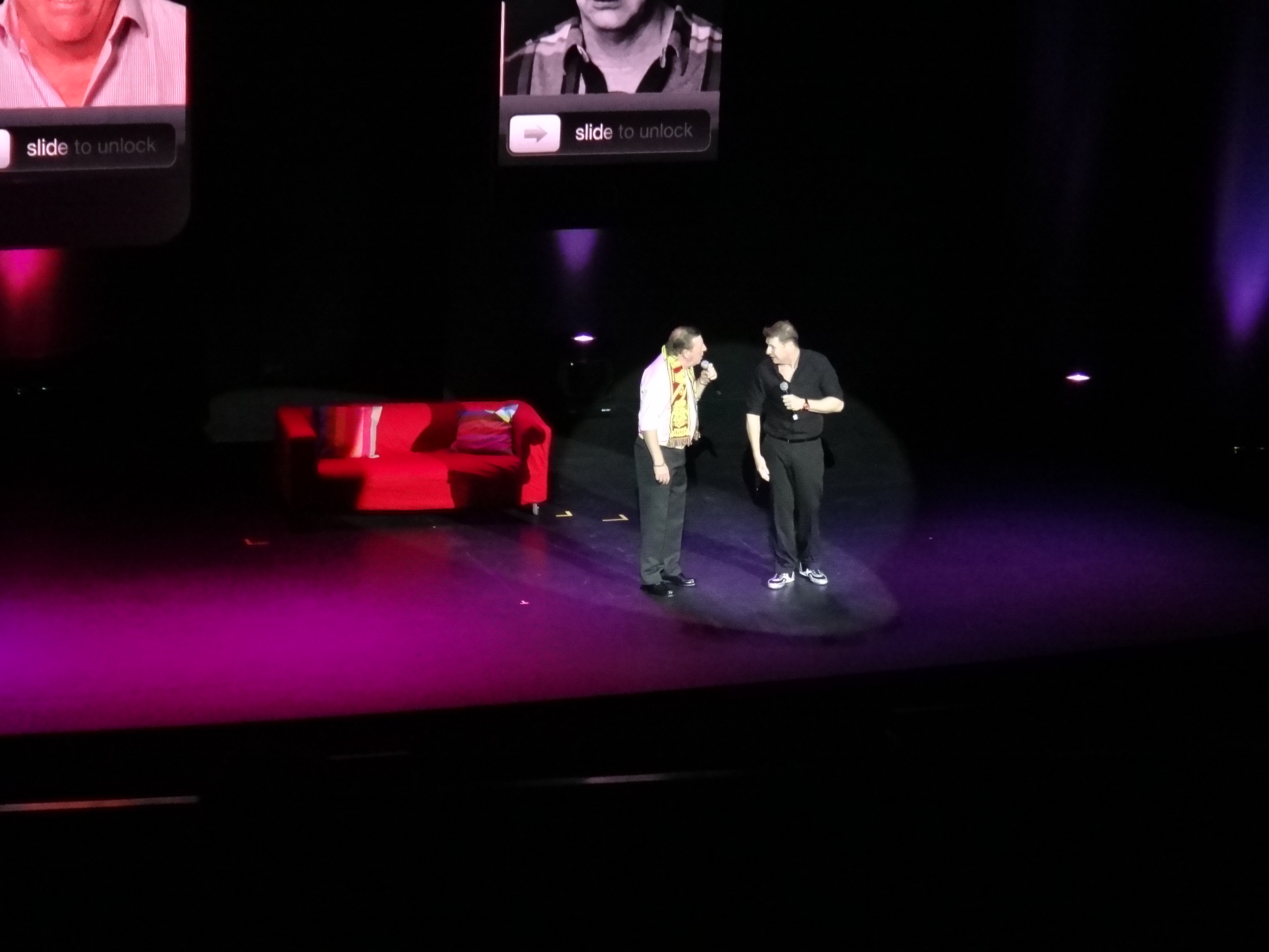 Espectáculo de los Morancos "En positivo" en el Teatro Villamarta de Jerez de la Frontera (Andalucía, España)